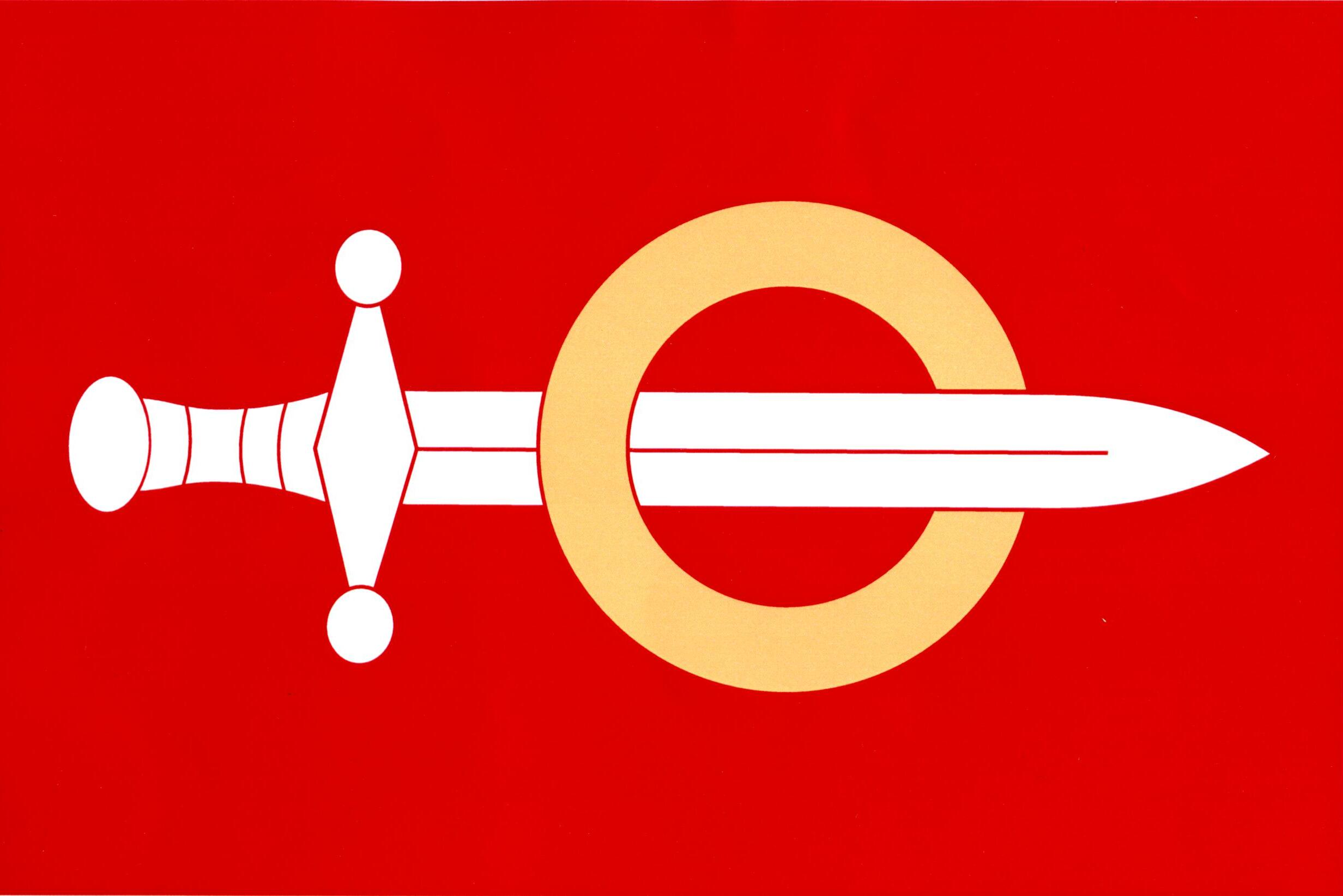 Vlajka obce Hrochův Týnec